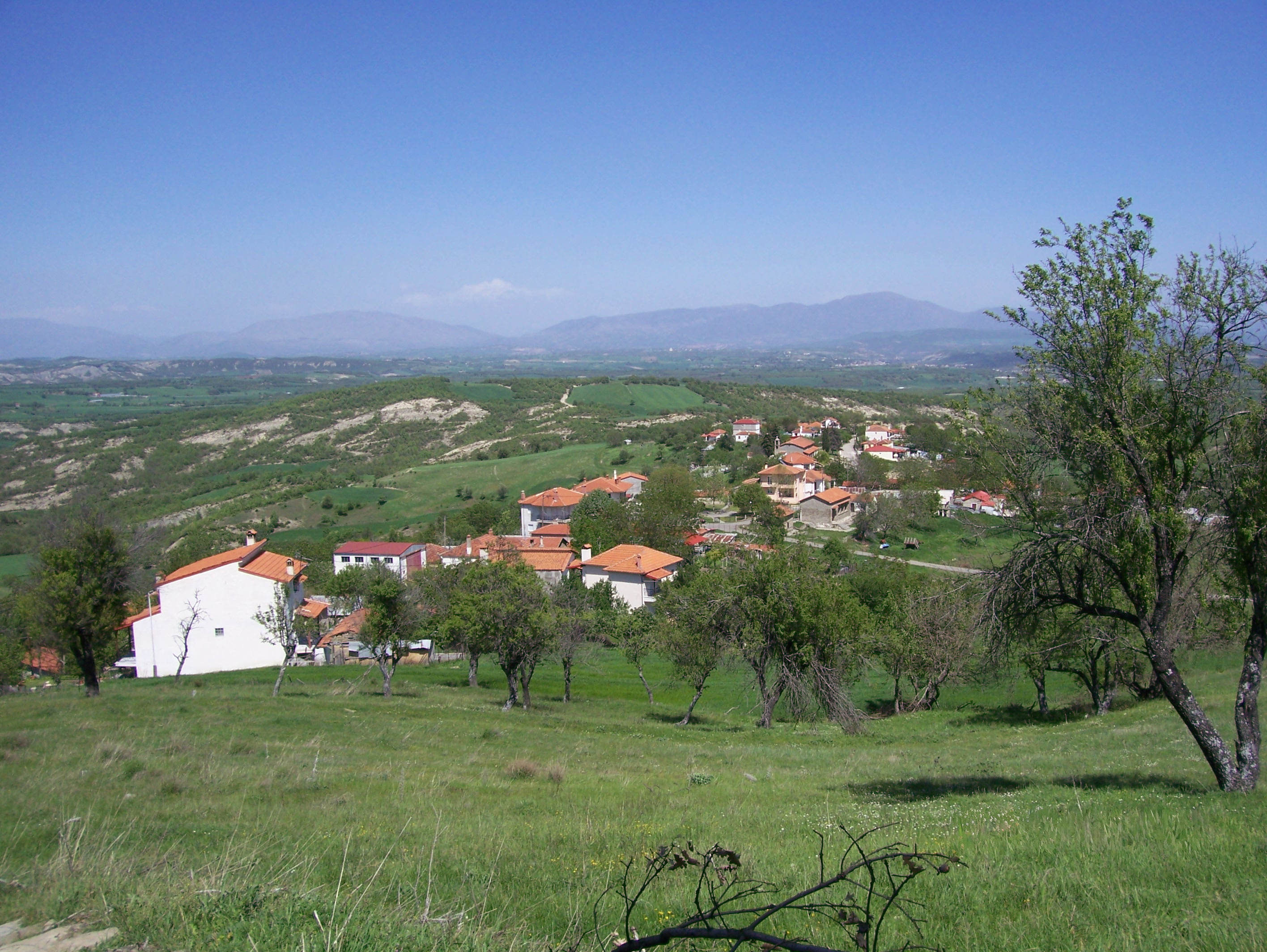 Μαυρονόρος Γρεβενών